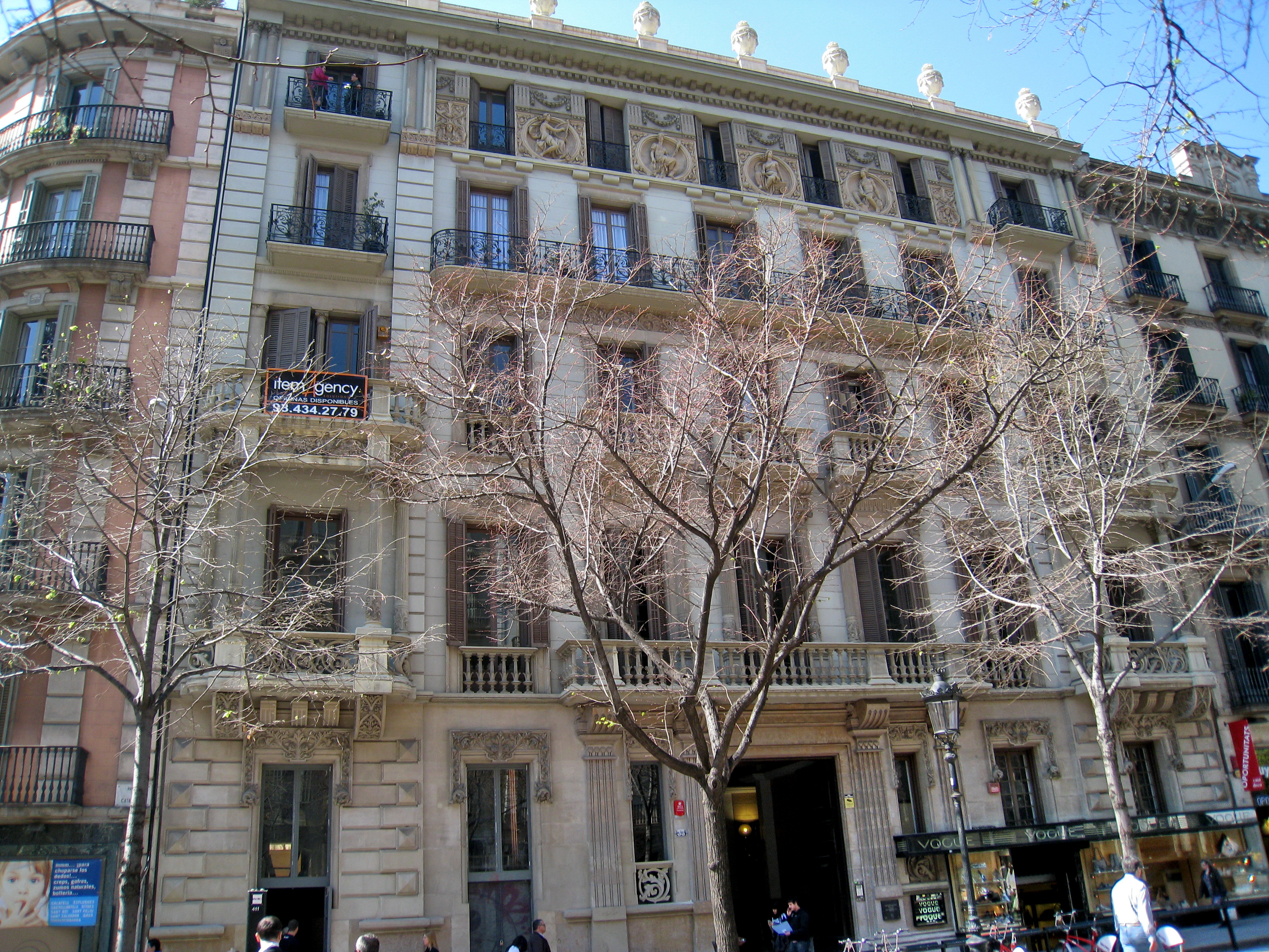 Casa Juncadella (Barcelona)